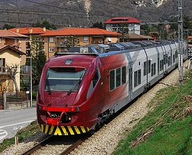 Giorgio Mantoan (con Simone Carcano), CSA in Livrea Malpensa Express. Foto scattata il 31 marzo 2010 presso la stazione di Canzo-Asso con fotocamera Nikon D60.